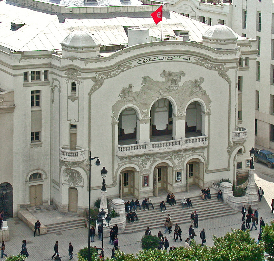 Théâtre municipal de la ville de Tunis